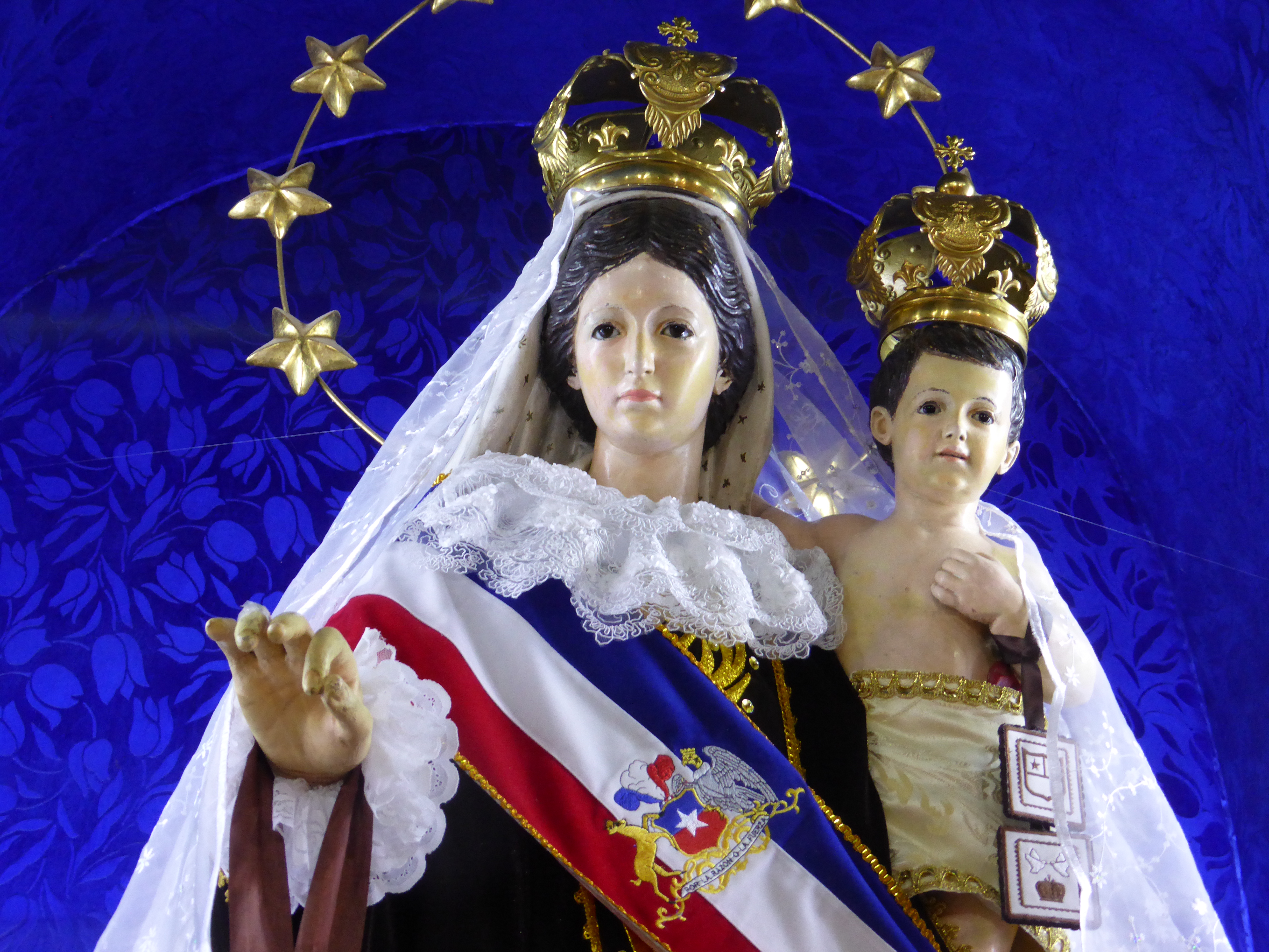 Arte sacro. Virgen del Carmen de Chile. Cada 16 de julio se celebra la fiesta de la Virgen del Carmen en el pueblo de La Tirana.